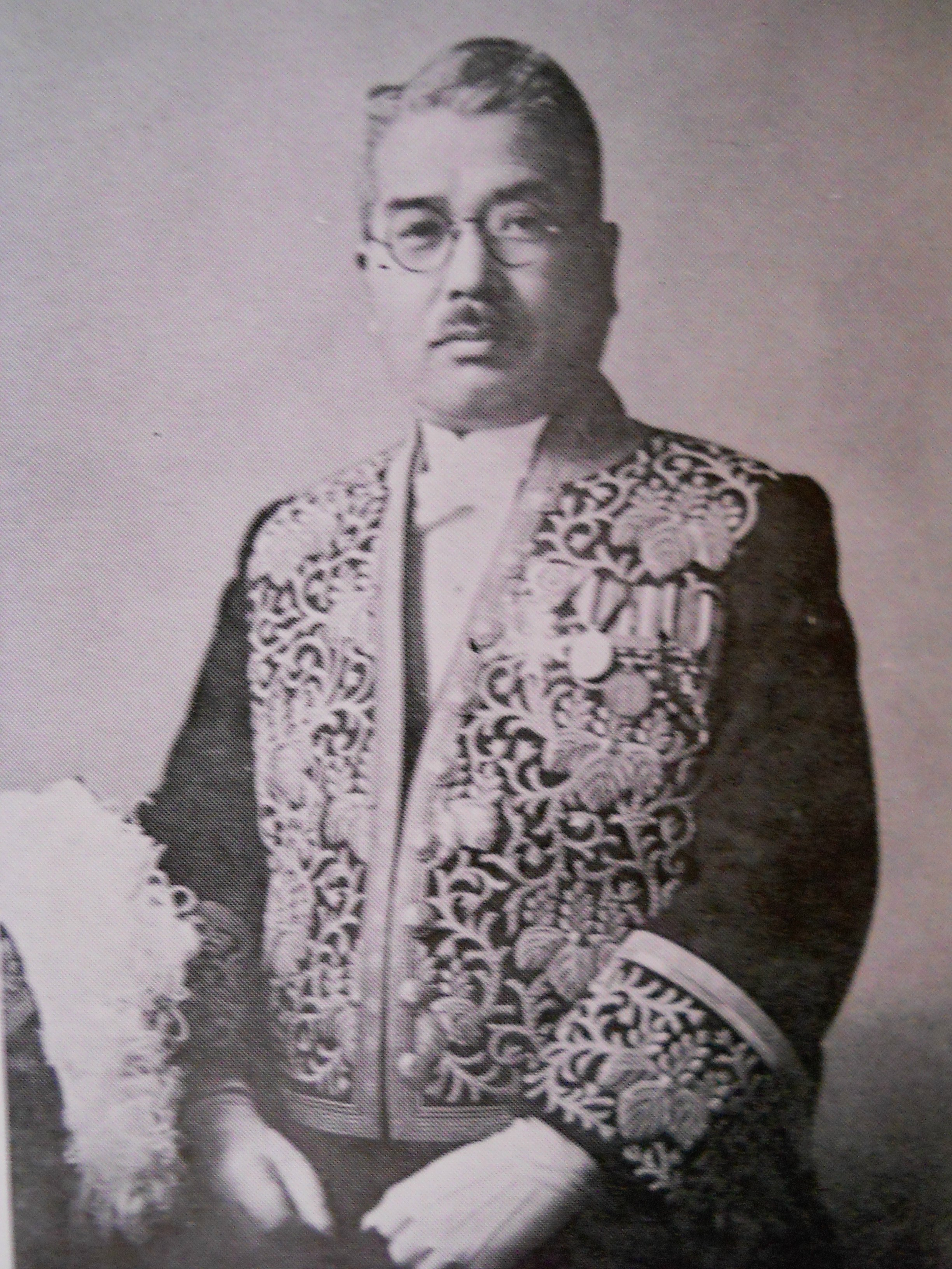 Ｔｅｓｈｉｍａ Ｓａｋａｅ